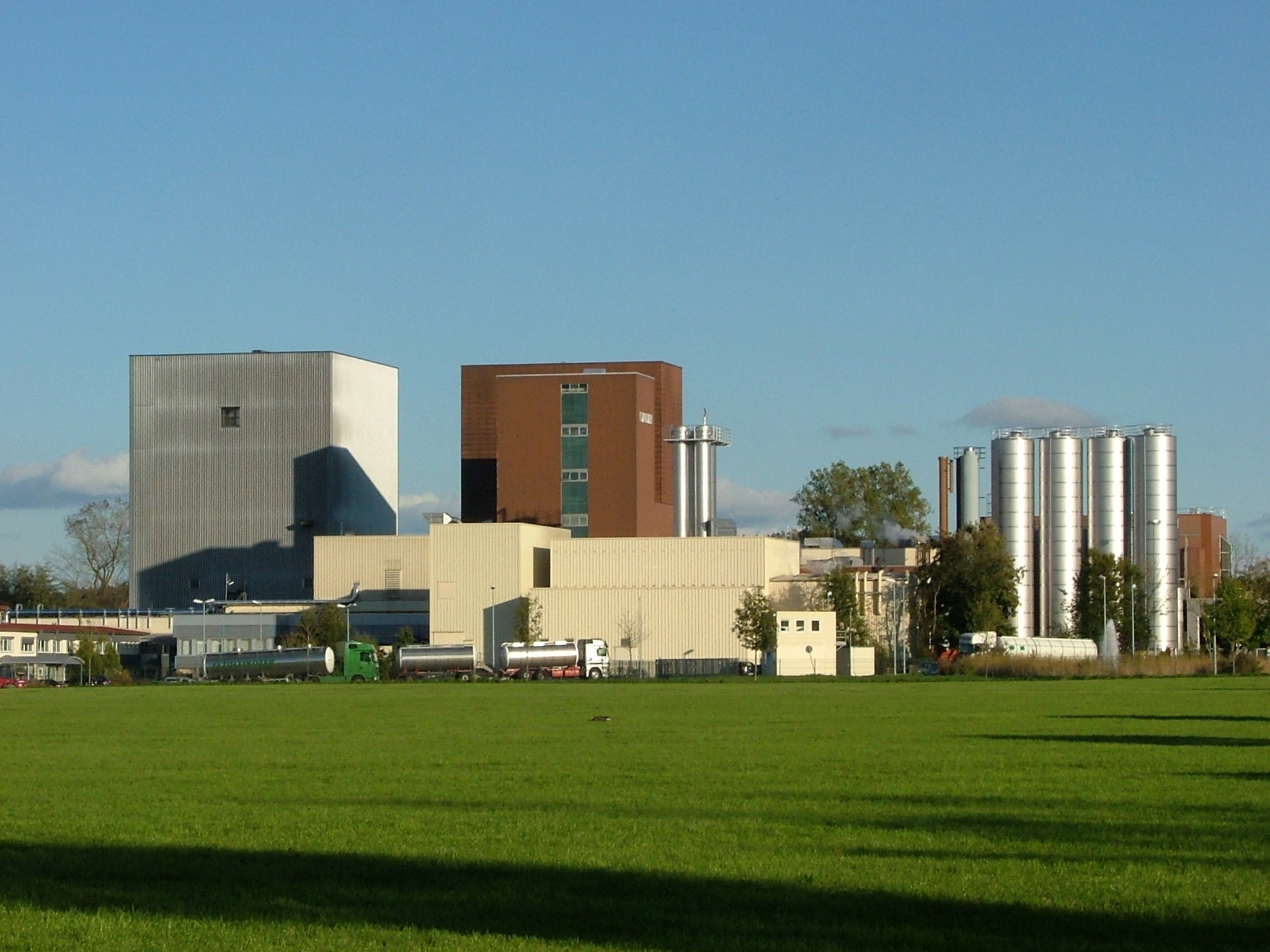 Milei